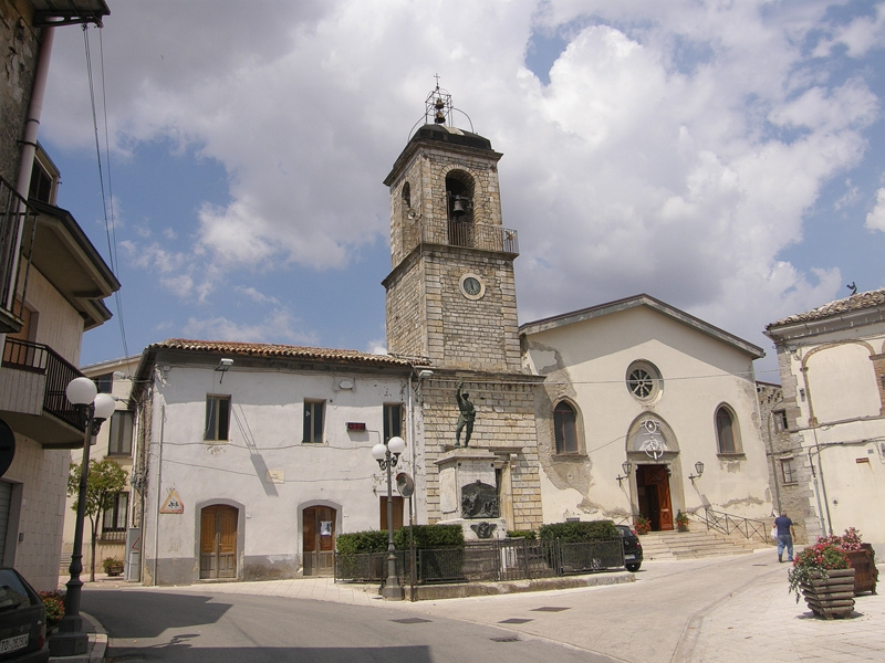 Apulia Molise Campania 2009